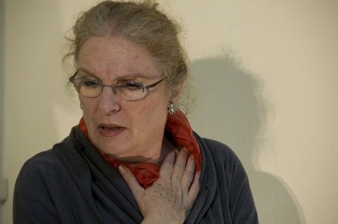 מיקי מרמור, השולחן עבודת כיתה צילום אלדד מאסטרו